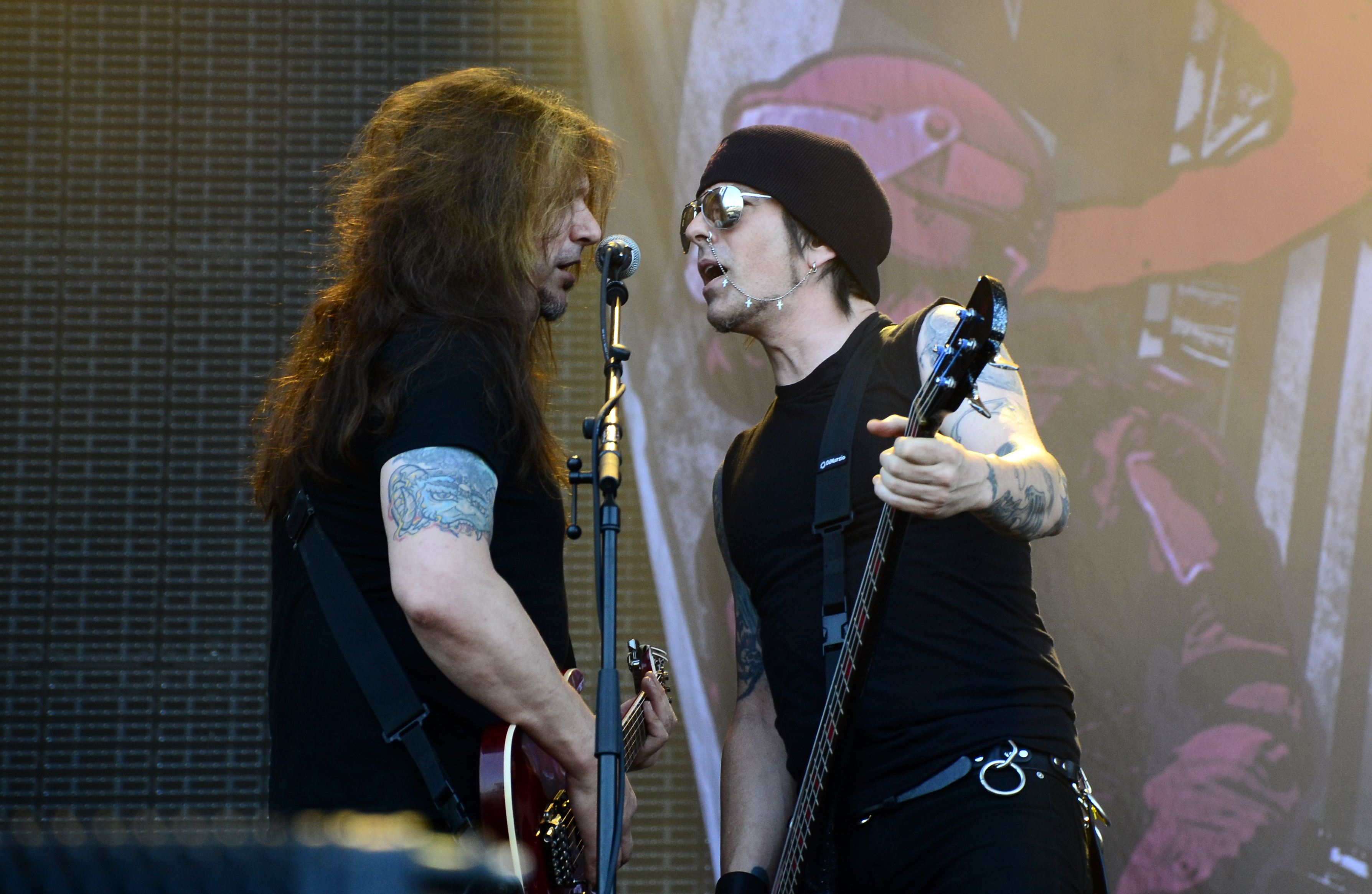 Skid Row beim Wacken Open Air 2014